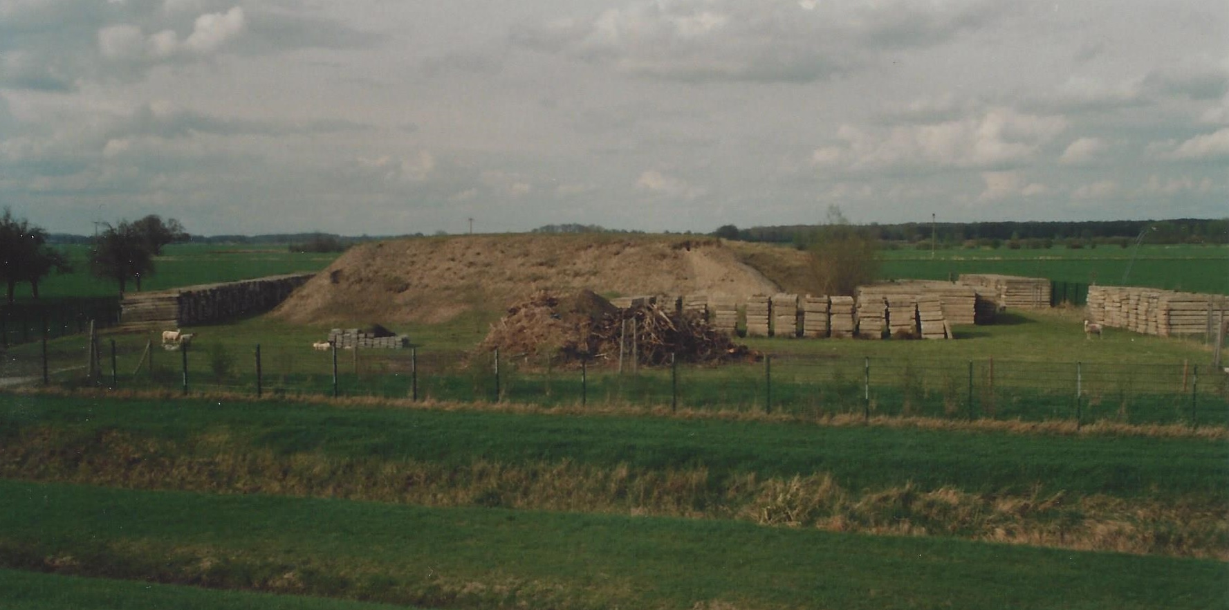 Lagerplatz für Sand und Material zur Deichsicherung hinter dem Elbedeich bei Gülstorf, Amt Neuhaus